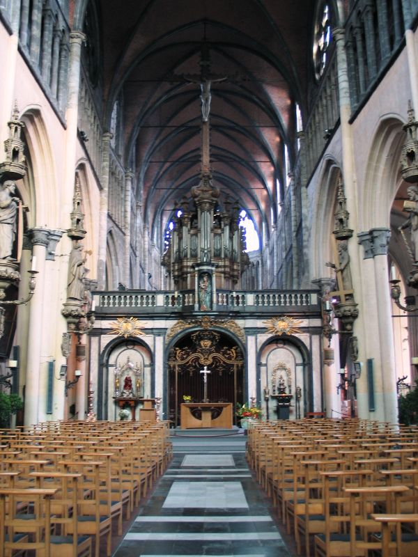 Interieur OLVkerk te Brugge